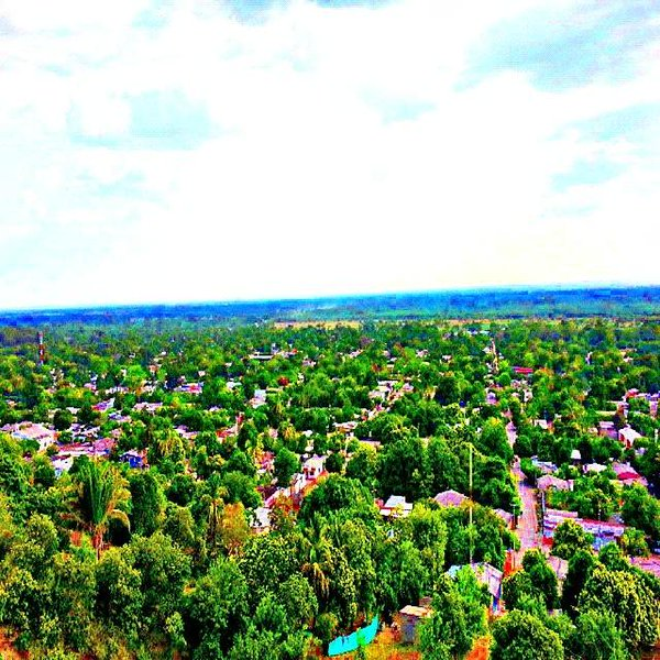 Panorámica de el pueblo